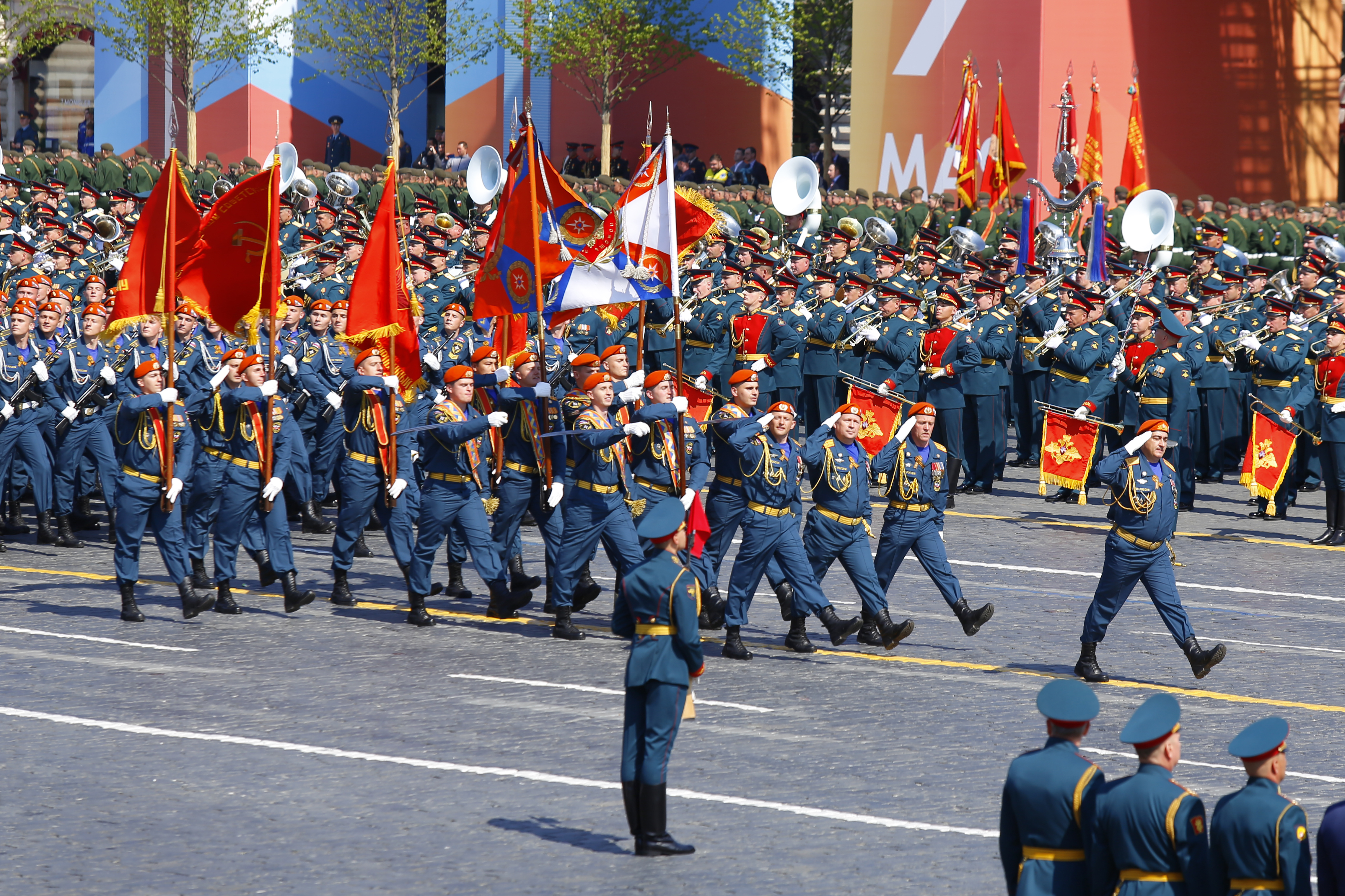 Участие в Параде Победы парадного расчета Академии гражданской защиты МЧС России